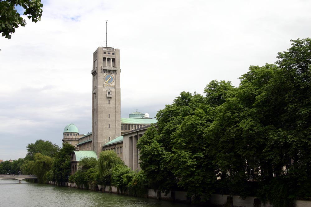 Deutsches Museum Fotograf: Softeis Lizenzstatus: GNU-FDL 22:34, 2. Jul 2004 Softeis 1000 x 667 (95628 Byte) 00:46, 7. Jul 2003 Softeis 320 x 226 (19227 Byte) (Deutsches Museum)